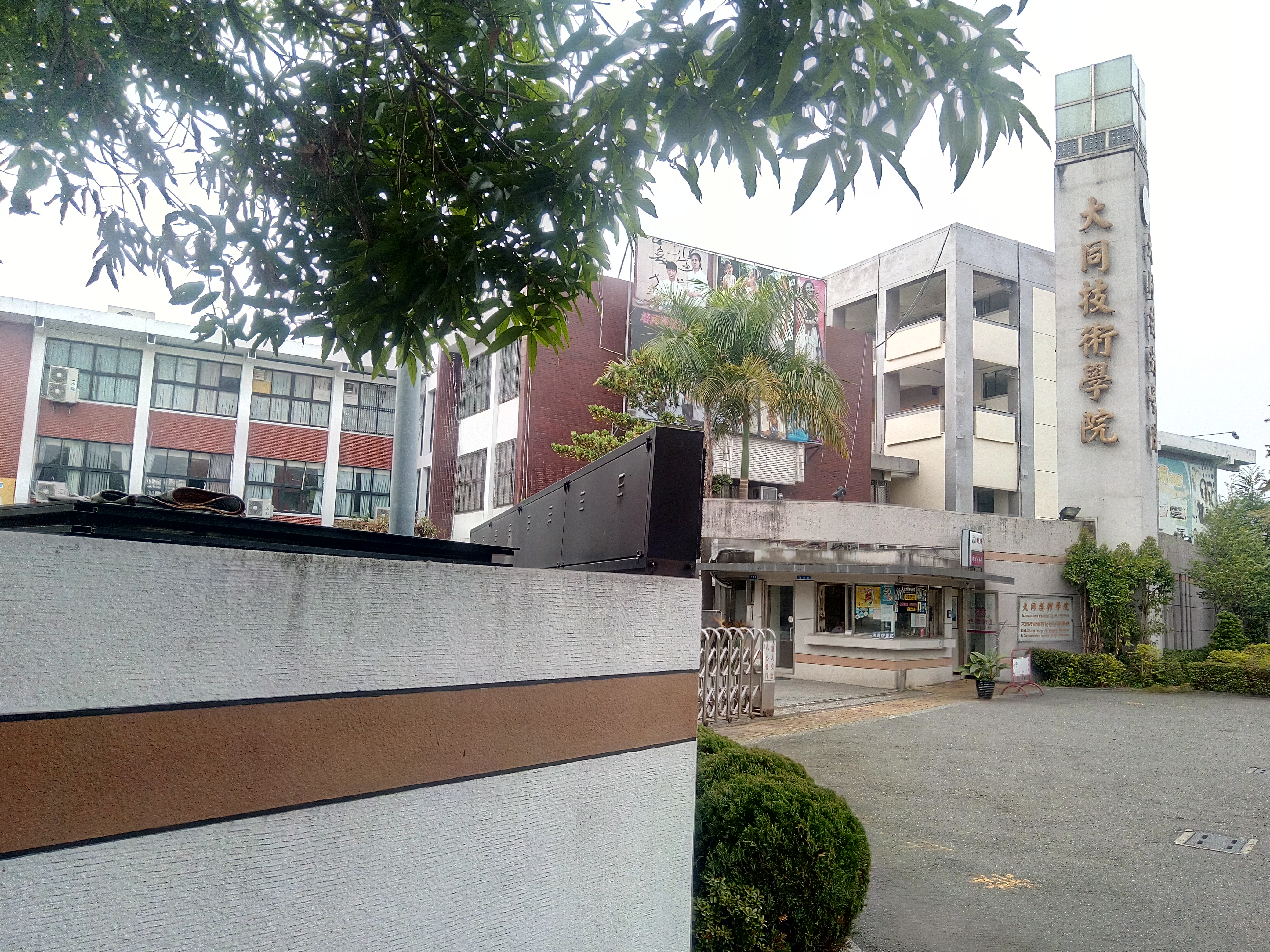 大同技術学院の正門